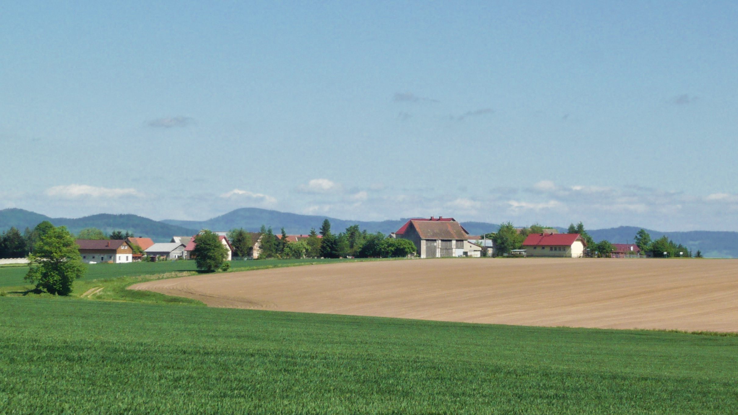 Widok wsi Ruszowice